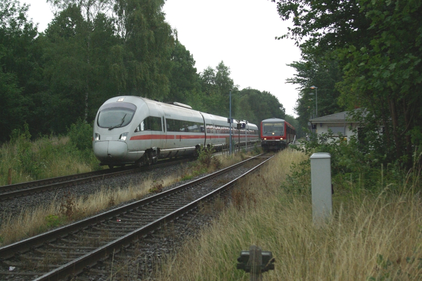 605 010 als ICE 38 Kopenhagen – Hamburg überholt am 04.08.2008 628 683 + 628 637 als RB 21717 Neustadt – Lübeck im Bahnhof Haffkrug.